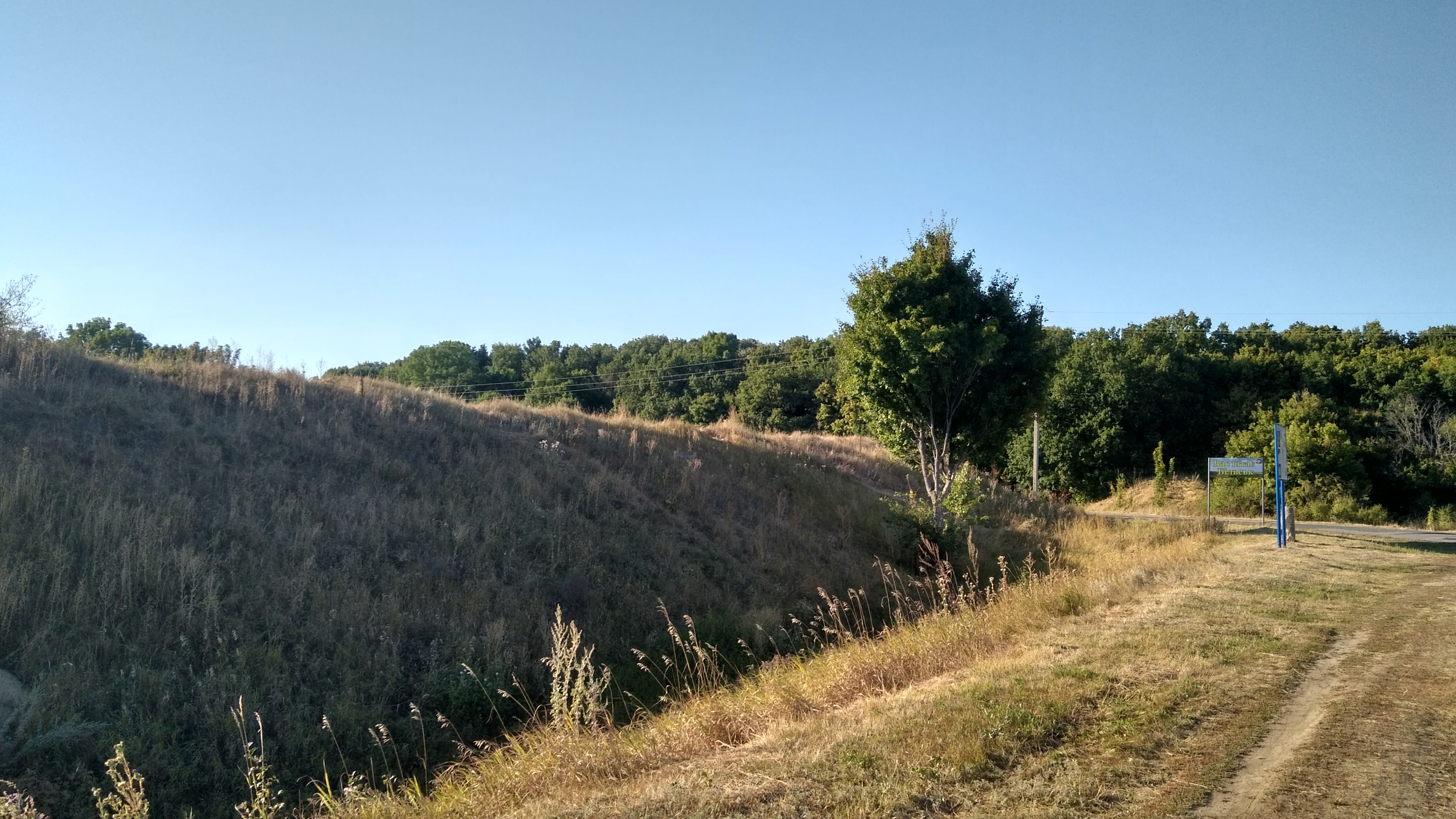 Комплекс пам'яток території і округи Більського городища – найбільшого з відомих укріплених поселень скіфського часу (VII-III ст. до н.е.), Більськ, території Малобудищанської, Батьківської сільрад Зінківського району і Куземинської сільради Охтирського району Сумської області